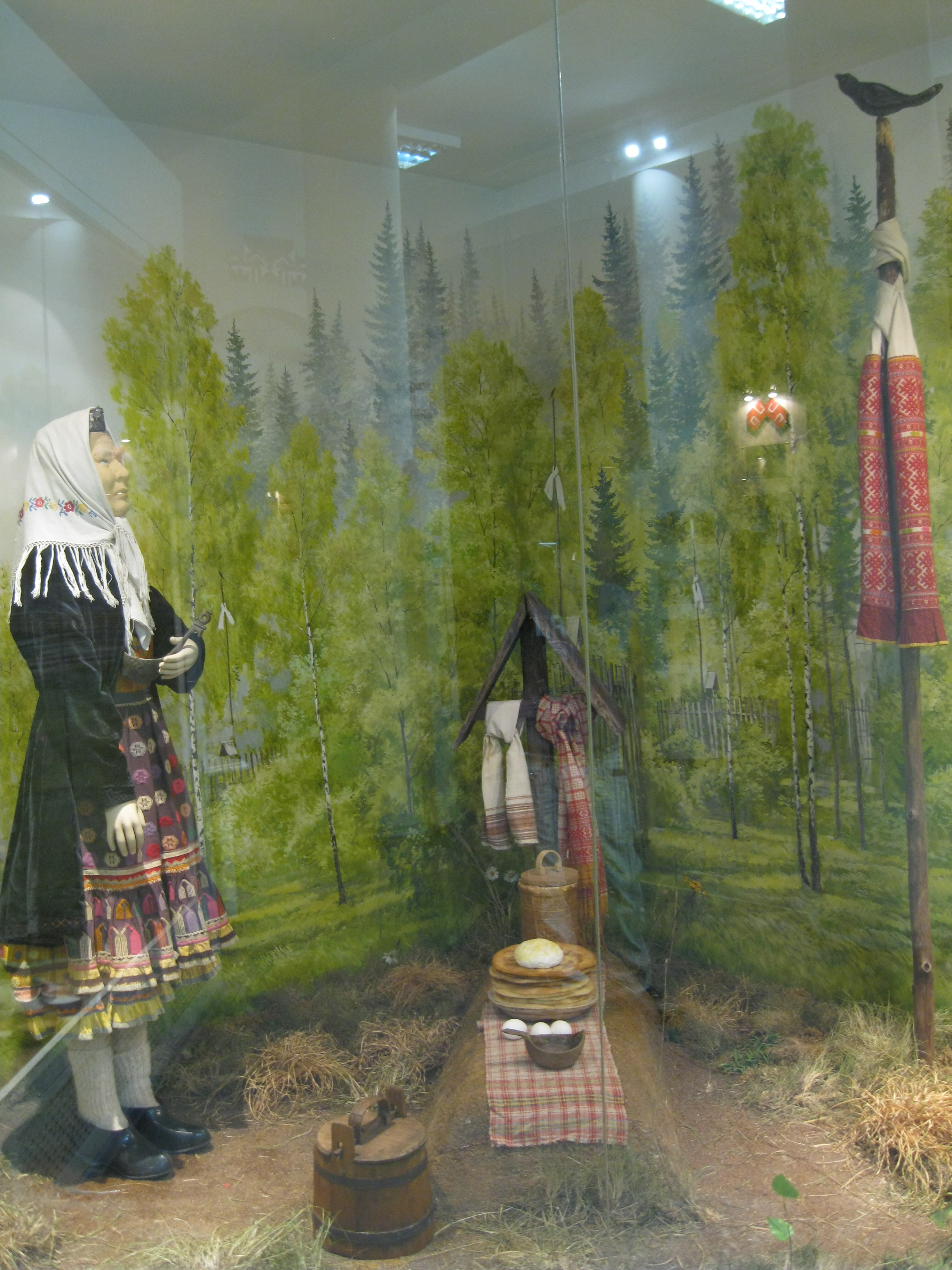 Погребение в марийской традиционной религии. Экспозиция Национального музея Республики Марий Эл, Йошкар-Ола.